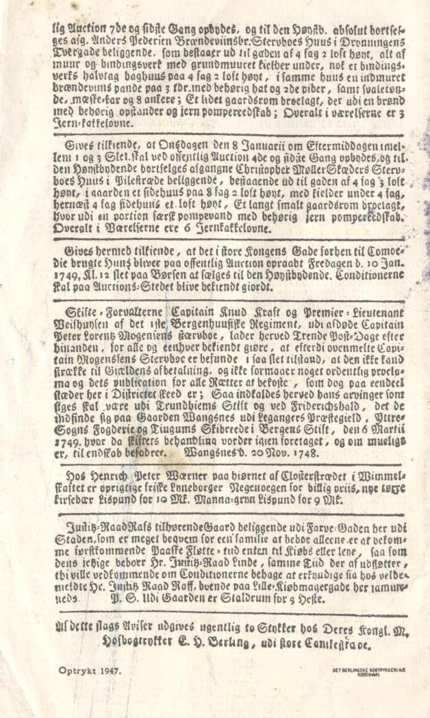 Berlingske Tidende. 1749. Første nummer. Iflg. den sidste side er udgivelsesåret dog 1947.